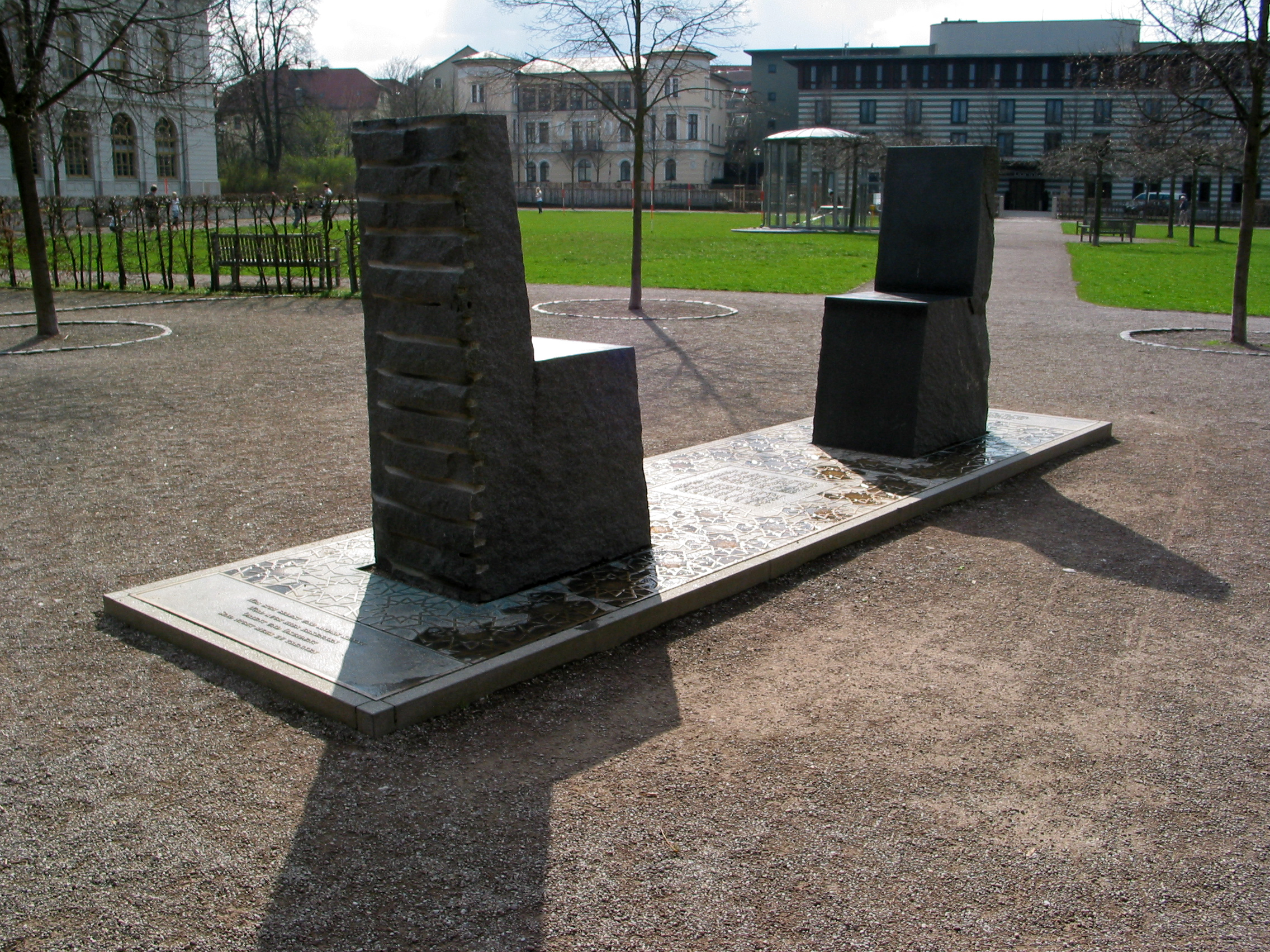 Das im Jahr 2000 eingeweihte Hafis-Goethe-Denkmal am Beethovenplatz mit zwei Stühlen, die an die Begegnung Goethes mit dem Werk des persischen Nationaldichters Hafis (1326-1390) erinnern.